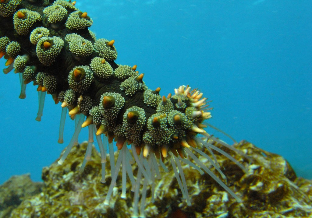 Estrella de mar Marthasterias glacialis, detalle del extremo de un brazo mostrando los pies ambulacrales y las espinas de la epidermis. Tenerife, la Orotava, islas Canarias, España.